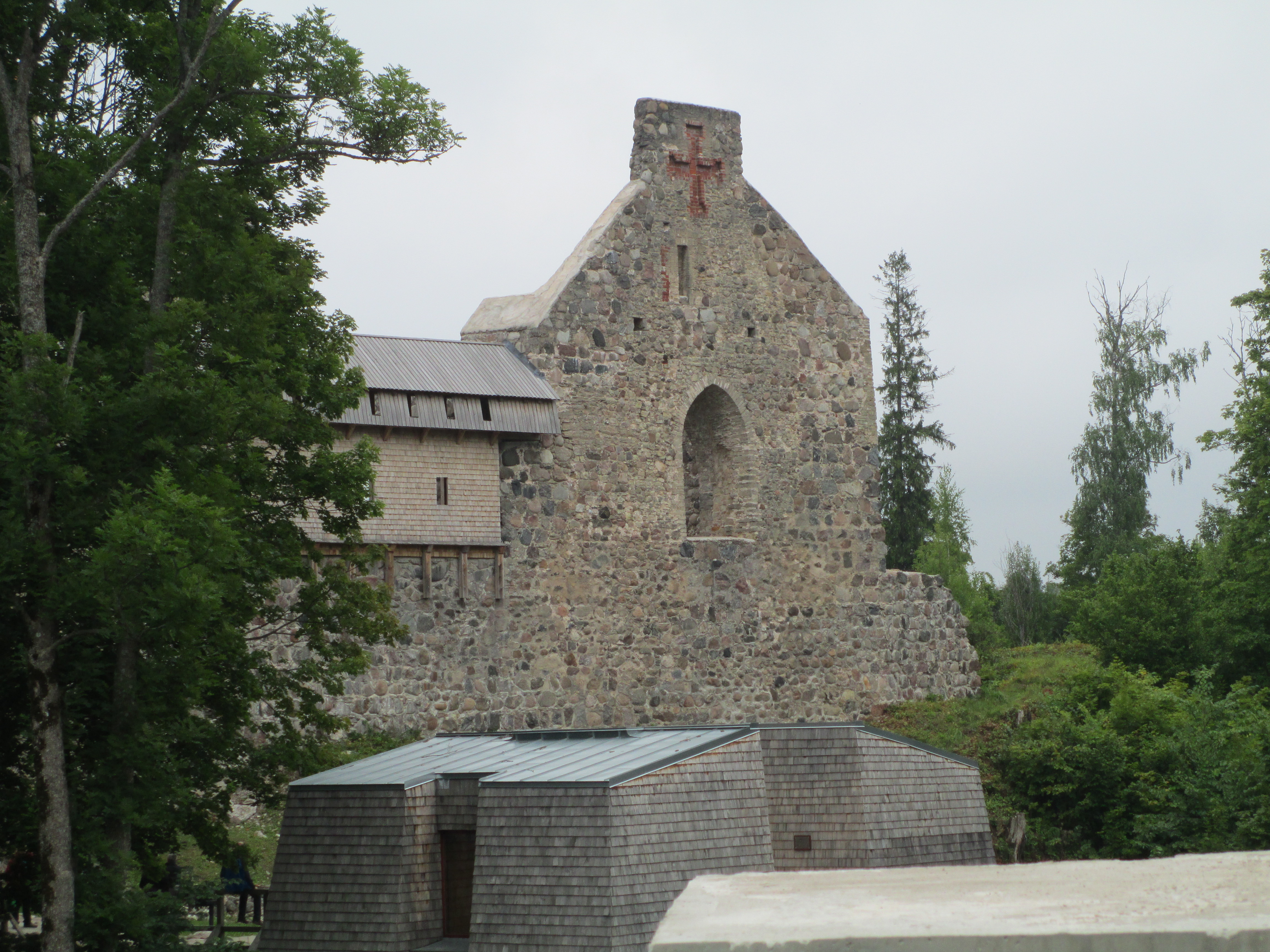 המצודה העתיקה בסיגולדה